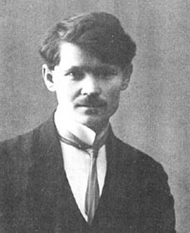 Фотопортрет Ансиса Цирулиса, латвийского художника